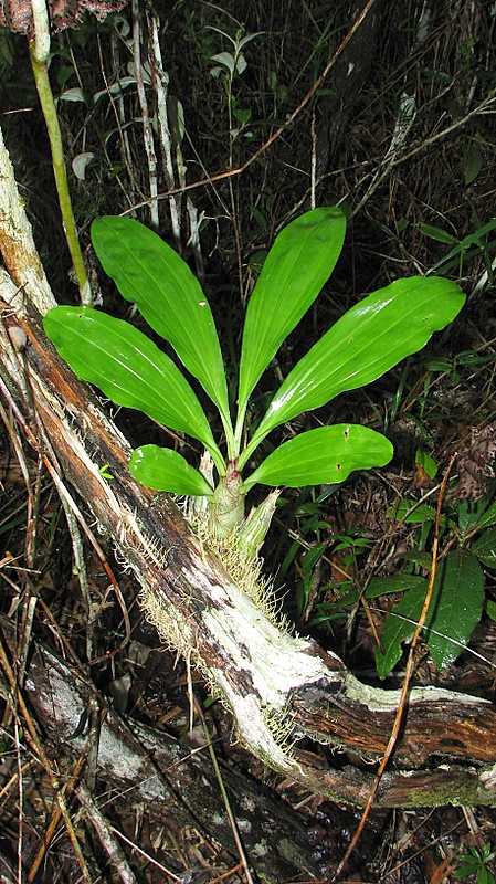 Catasetum macrocarpum. Habitat.